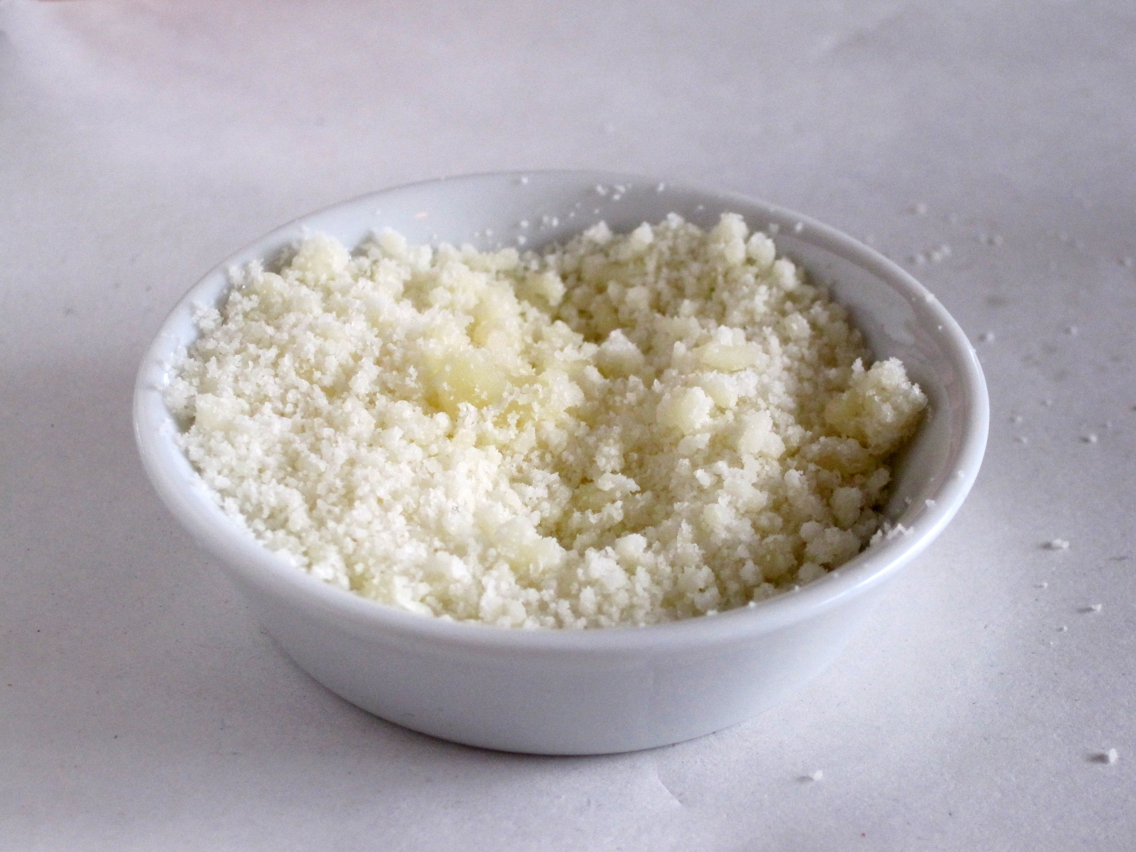 Template:Parmigiana-Reggiano